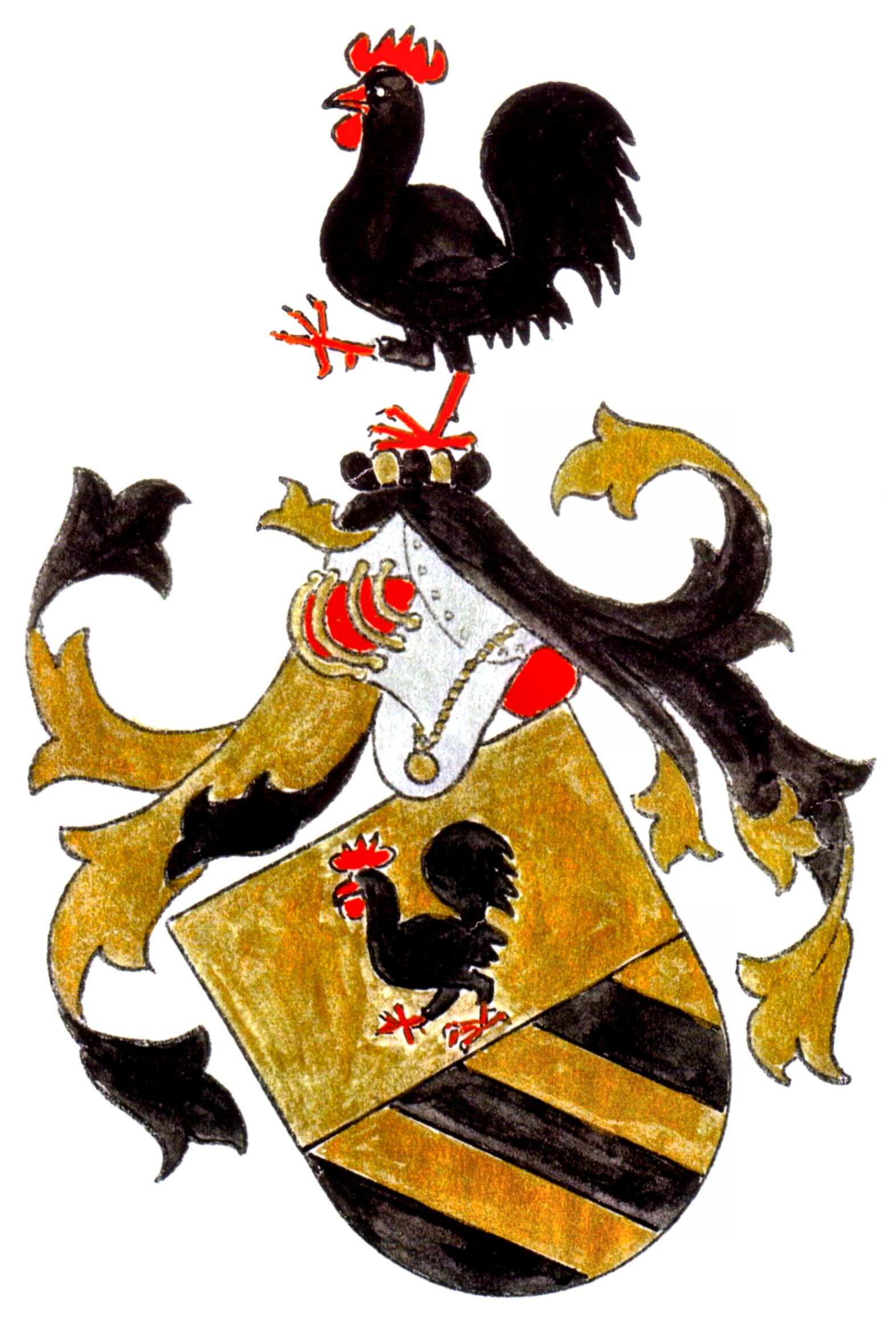 Wappen Freiherrn von Gall